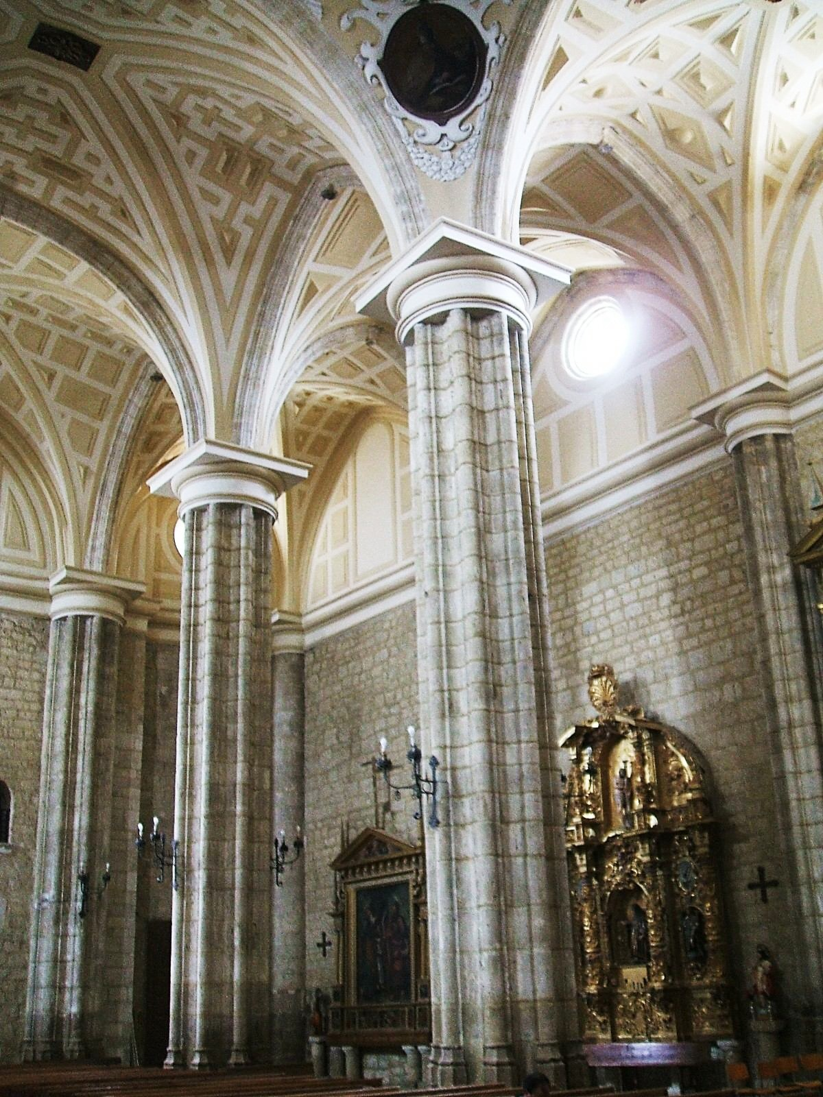 Iglesia de Santa Eugenia (s-XVI y XVII), Becerril de Campos, Palencia, España/Spain